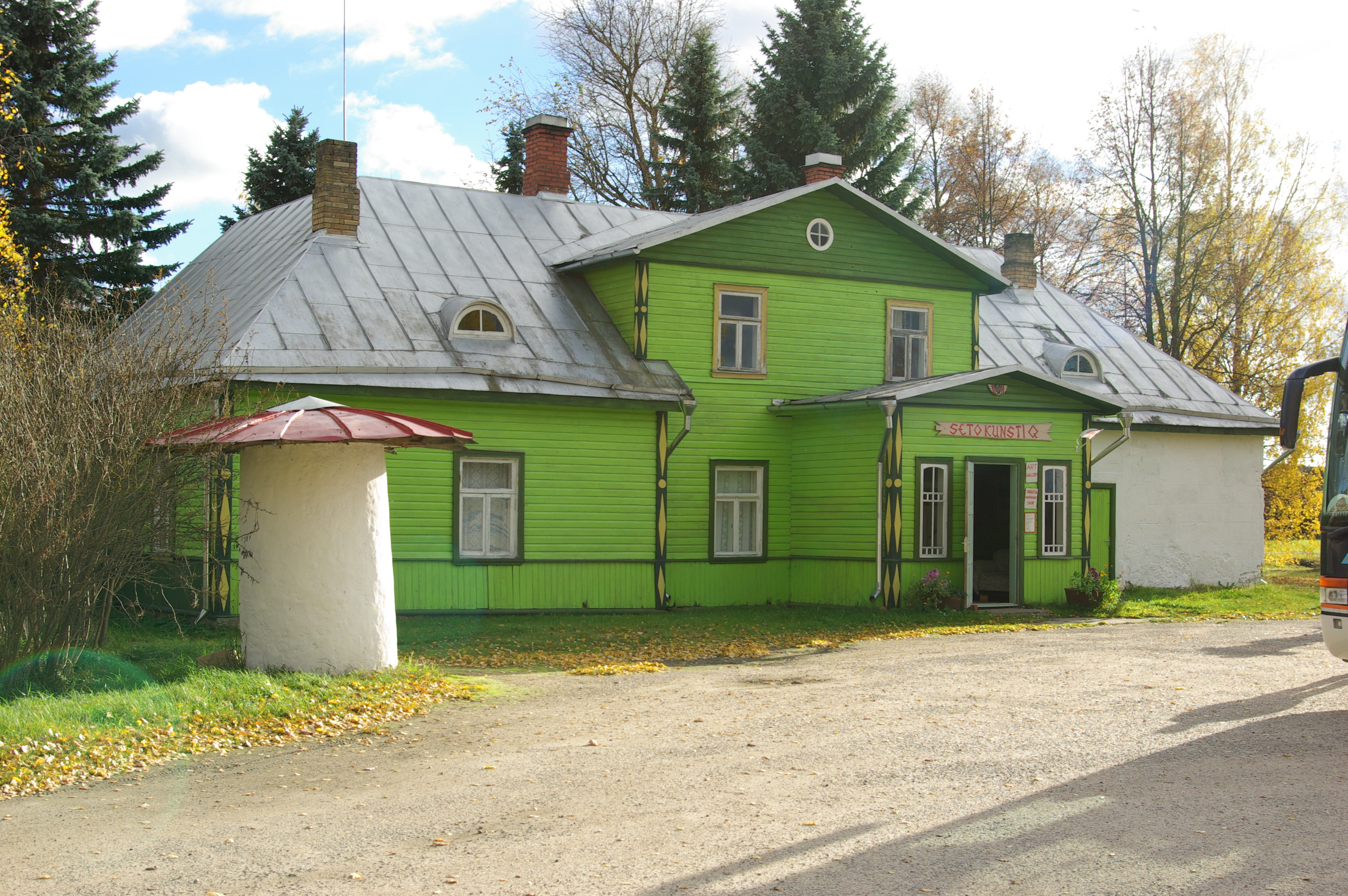 Obinitsa Ateljee-Galerii